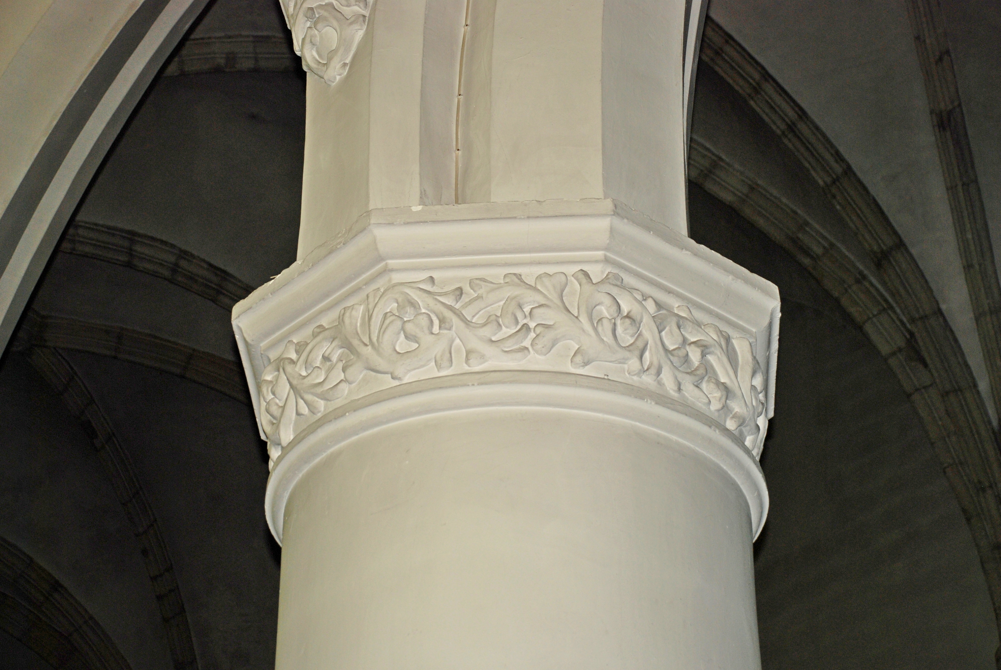 België - Vlaams Brabant - Asse - Sint-Martinuskerk